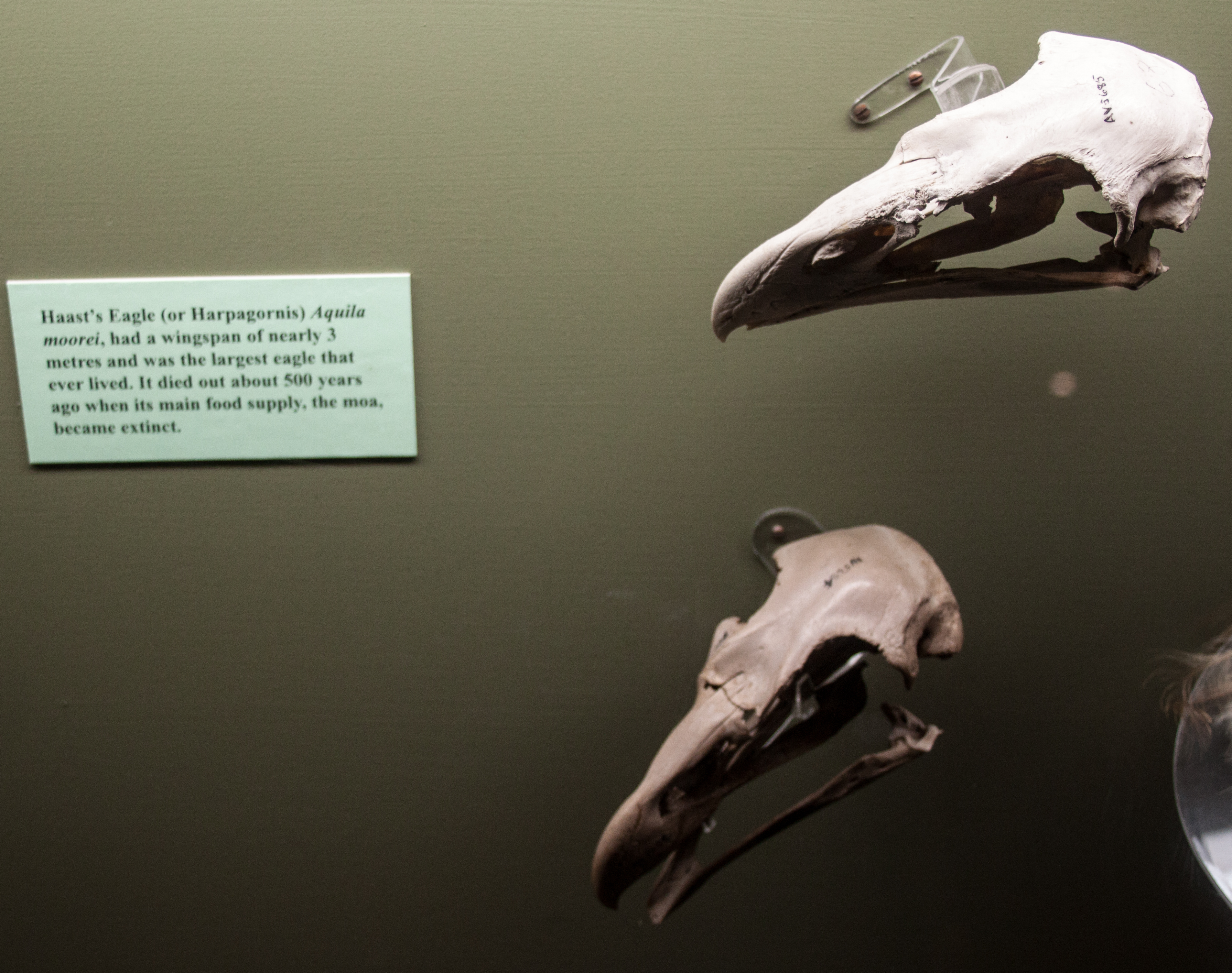 Haast's Eagle skulls